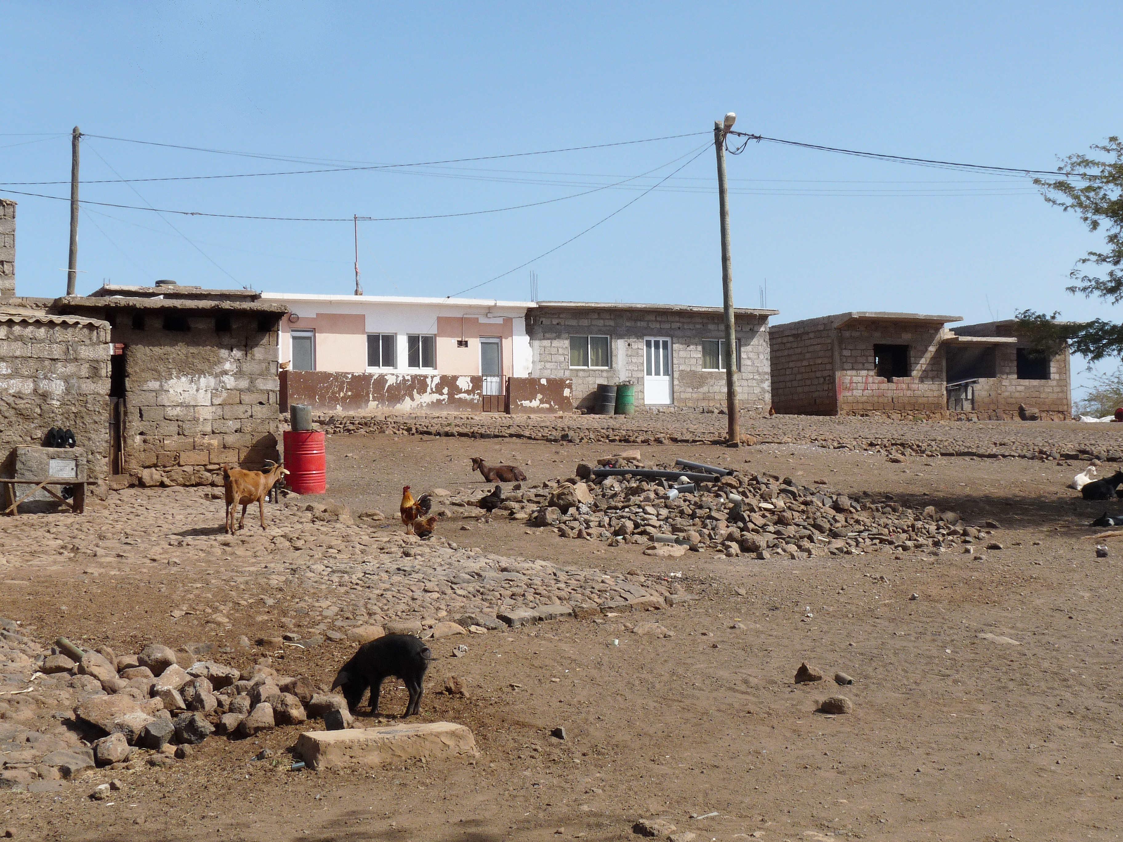 Calabaceira (Ribeira Grande de Santiago, Cap-Vert)